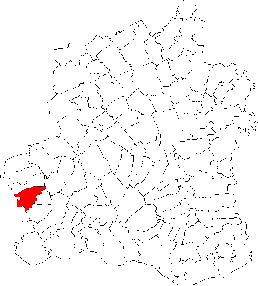 Categorie:Hărţi ale judeţului Teleorman